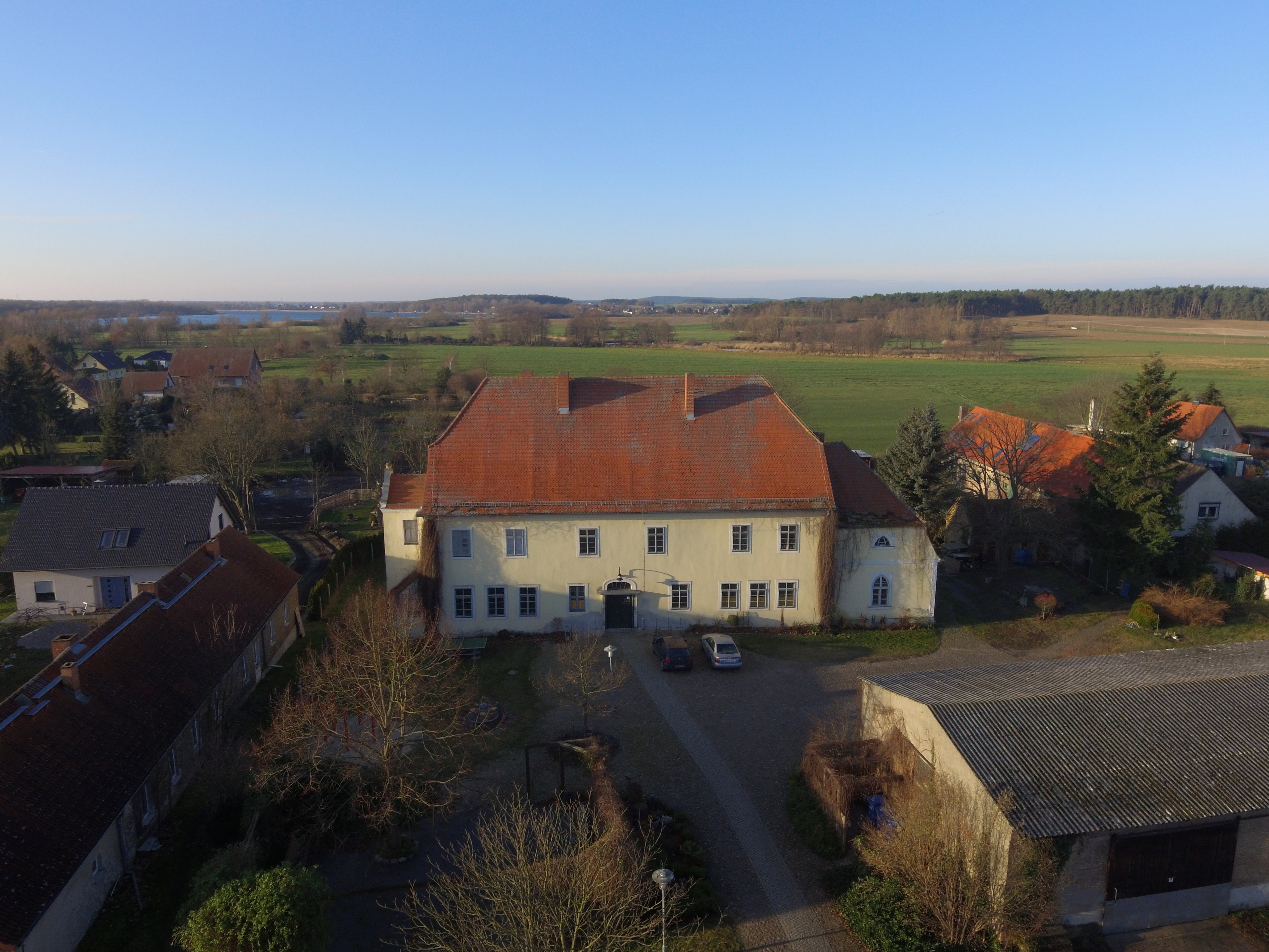 Luftbild Gutshaus Ketzür